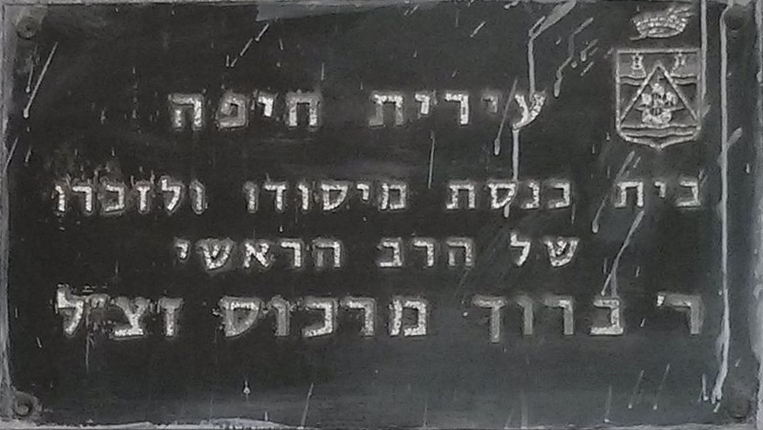 שלט ההנצחה על בית הכנסת שערי צדק הגליל מיסודו של הרב מרקוס. (ערוך)